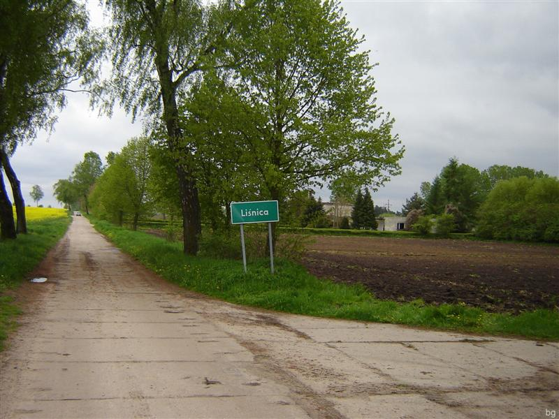 wjazd do osady